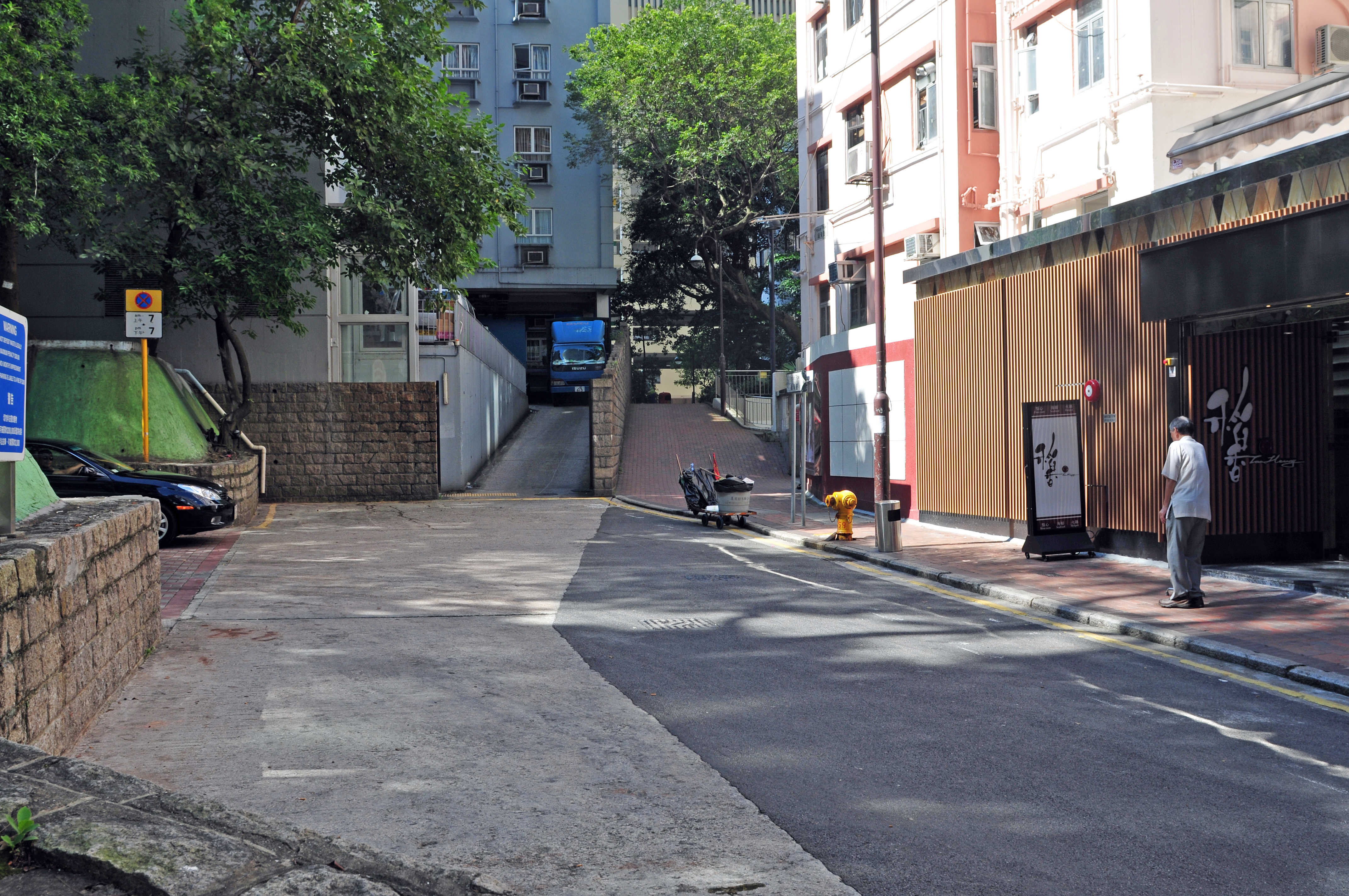 Wikimania 2013 Hongkong